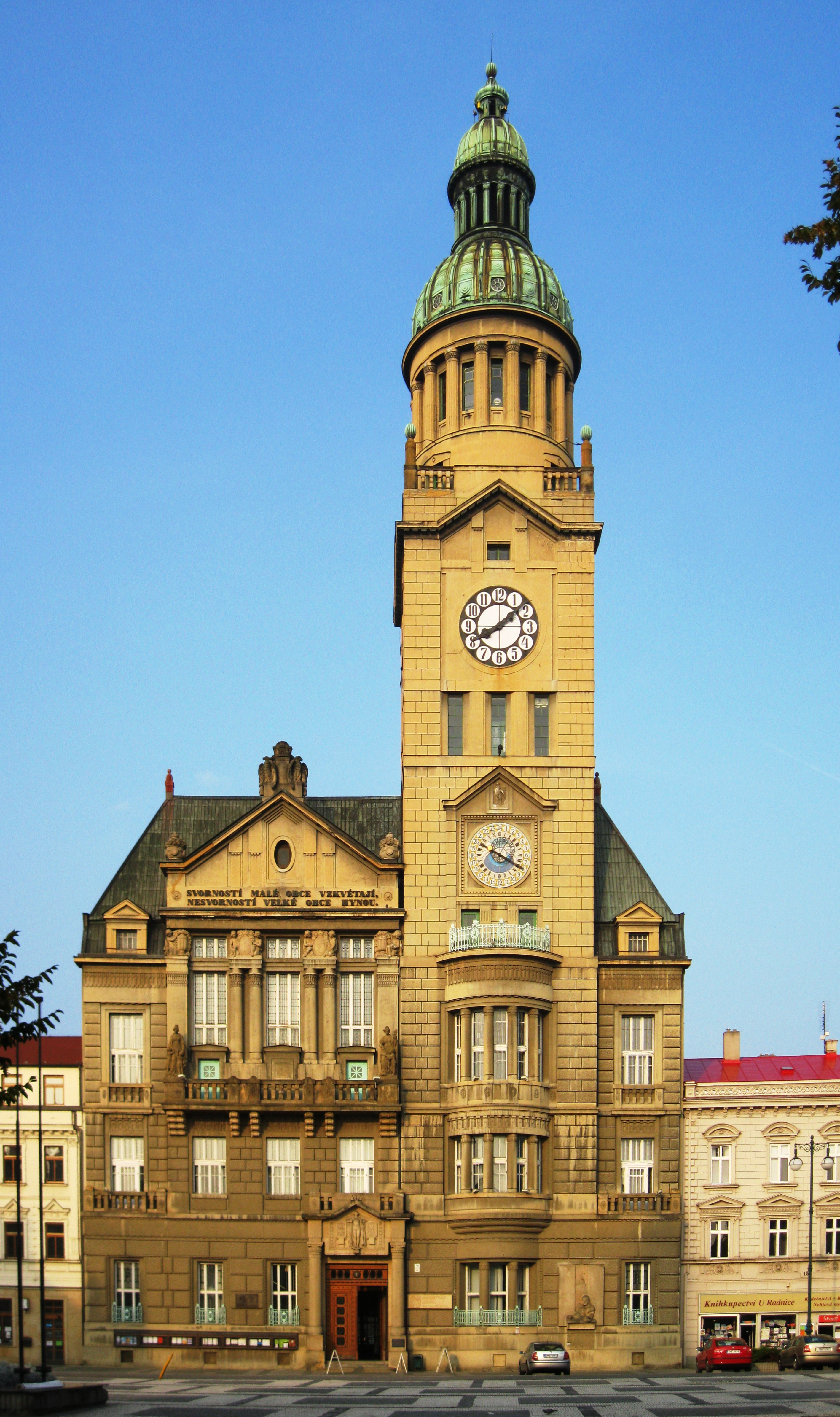 Radnice Nová (Prostějov), nám. T. G. Masaryka 130/13, Prostějov